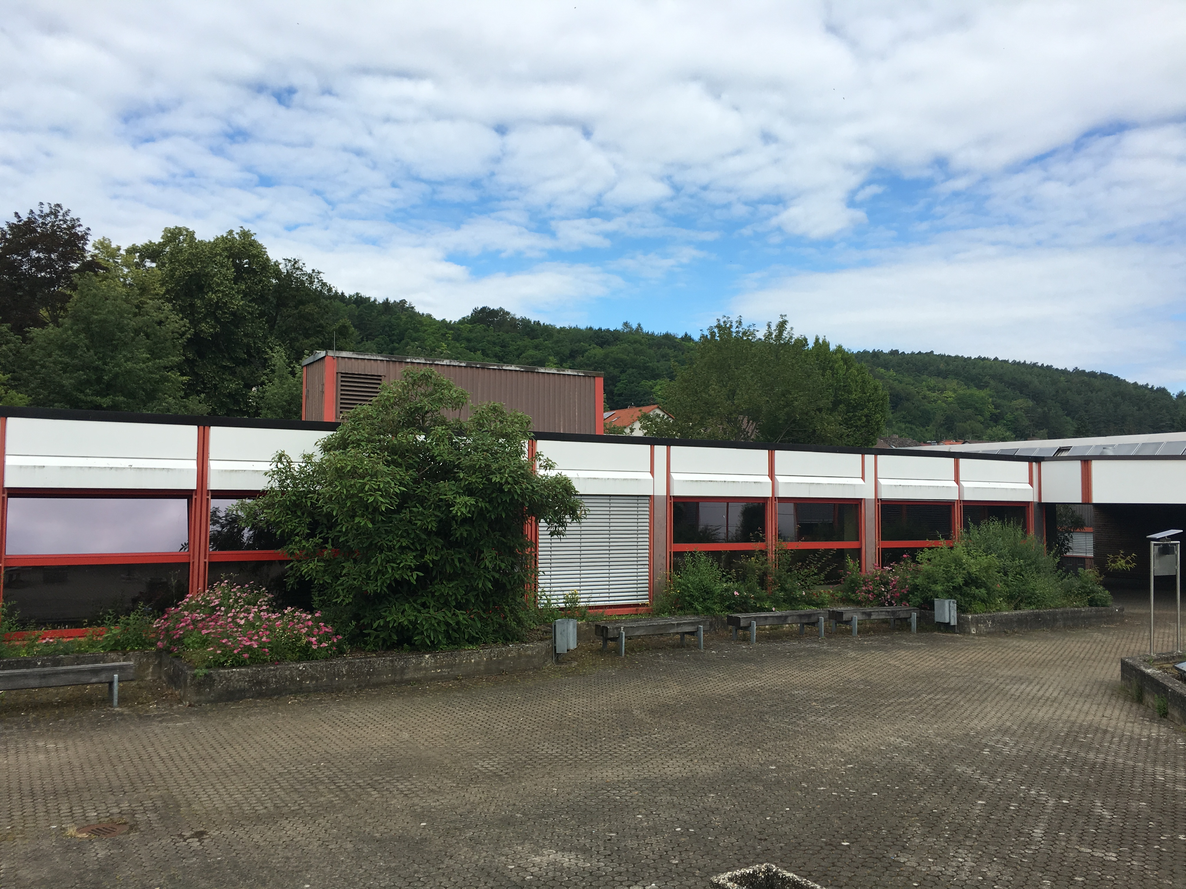 Gewerbliche Sporthalle Tauberbischofsheim